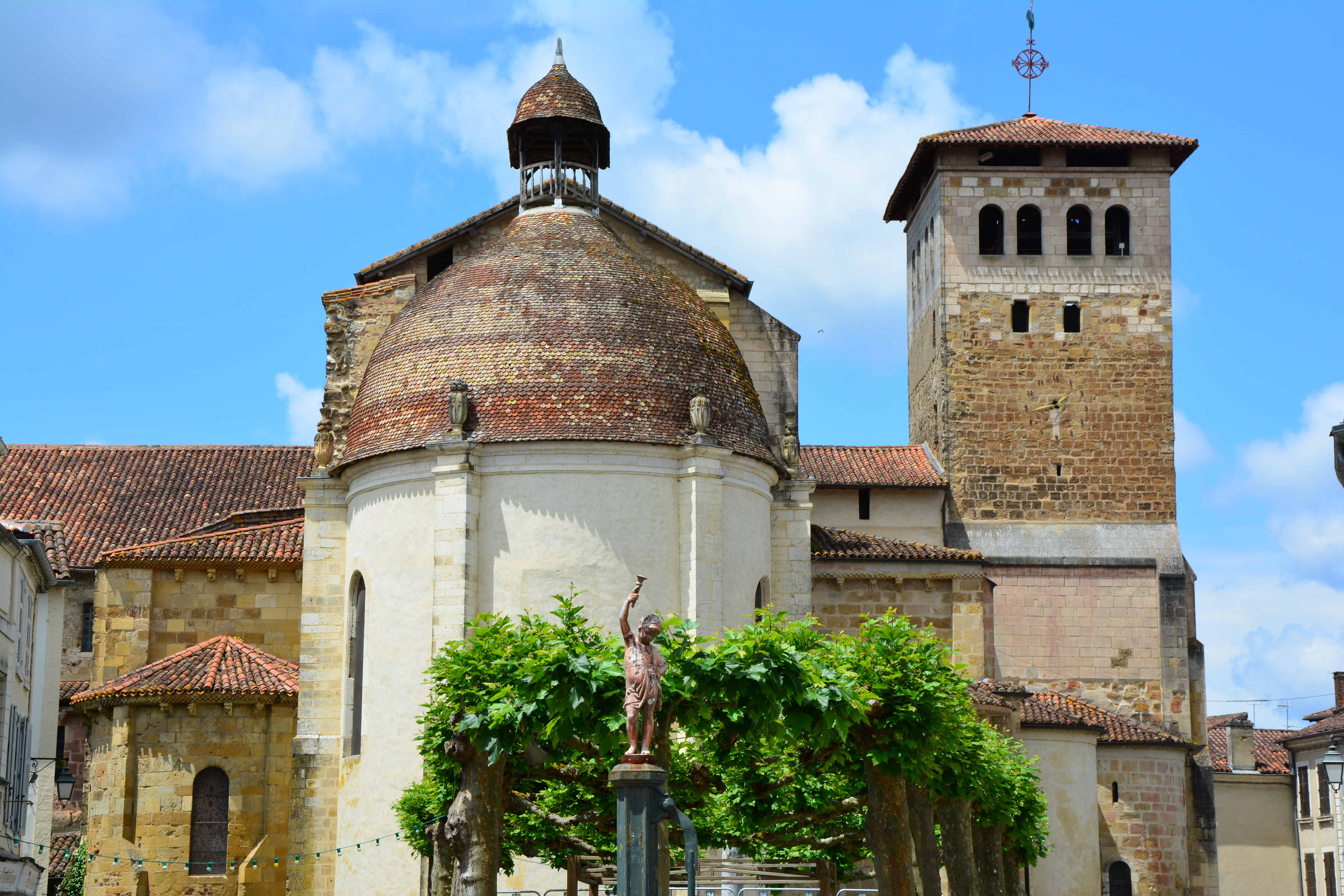 Chevet de l'abbatiale de Saint-Sever vu de la place de Verdun